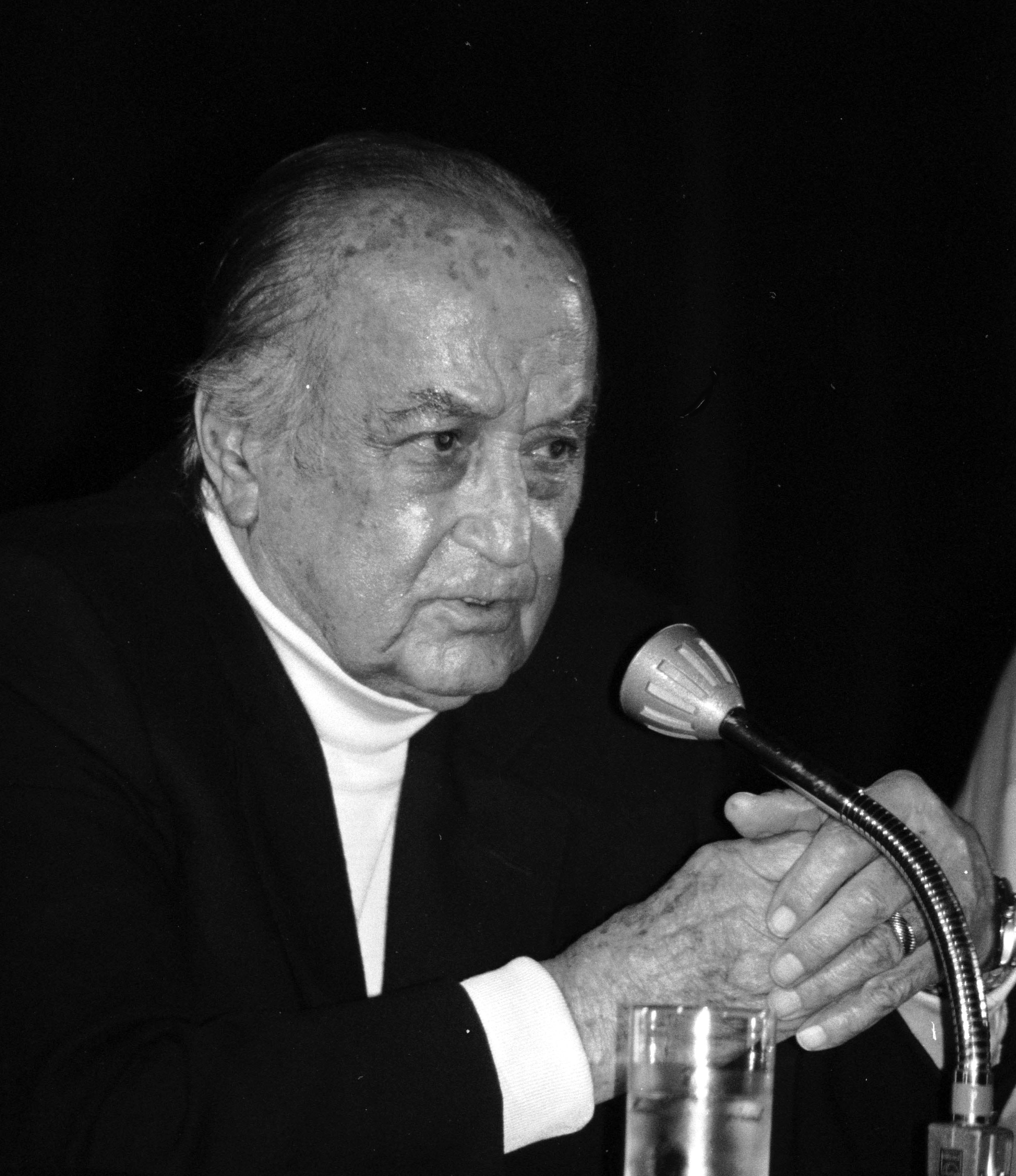 Le réalisateur de cinéma Jean Negulesco au Festival du cinéma américain de Deauville (Normandie, France) en 1986.